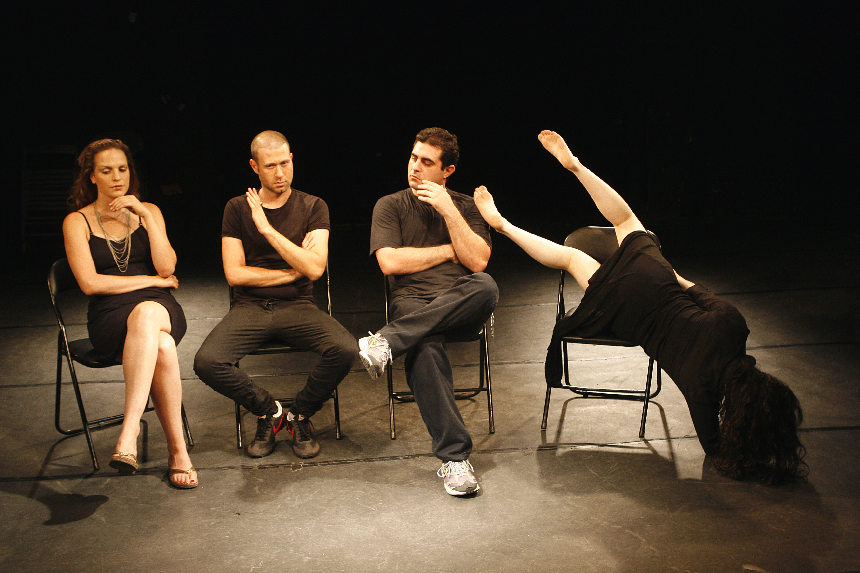 ההצגה שופרא